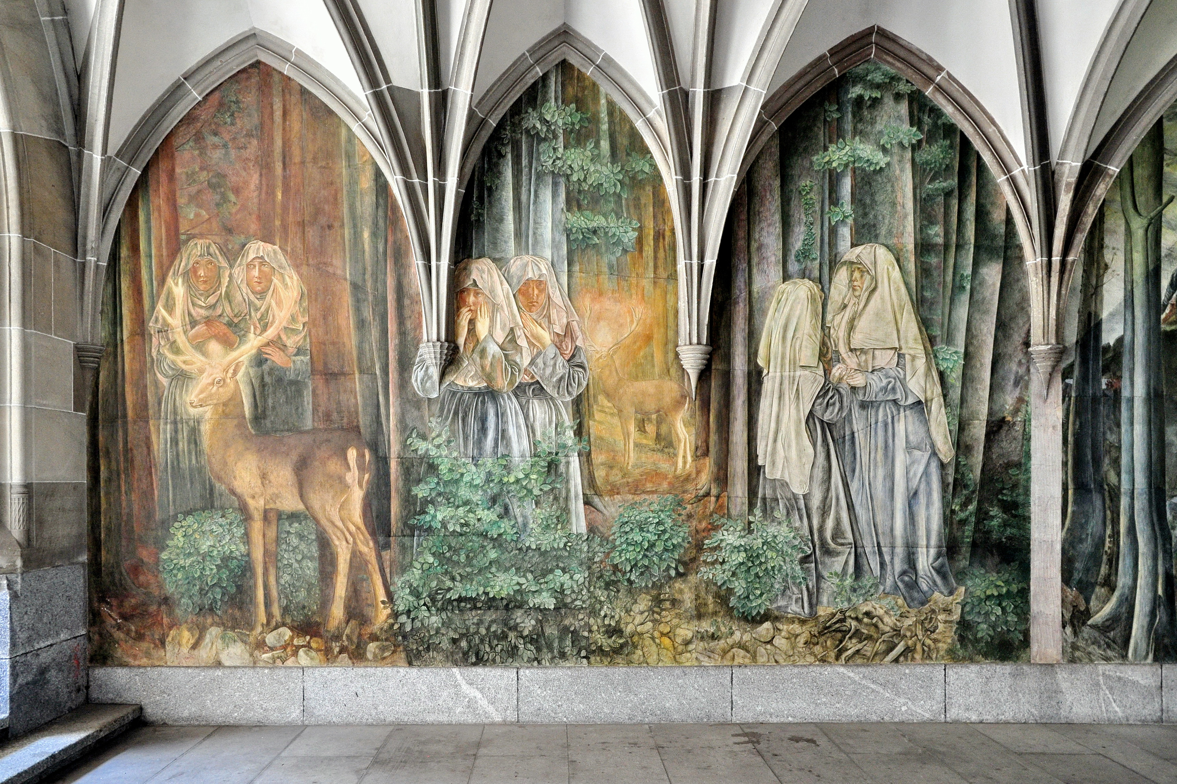 Paul Bodmers Wandmalereien im Kreuzgang des Fraumünsters in Zürich (Schweiz)